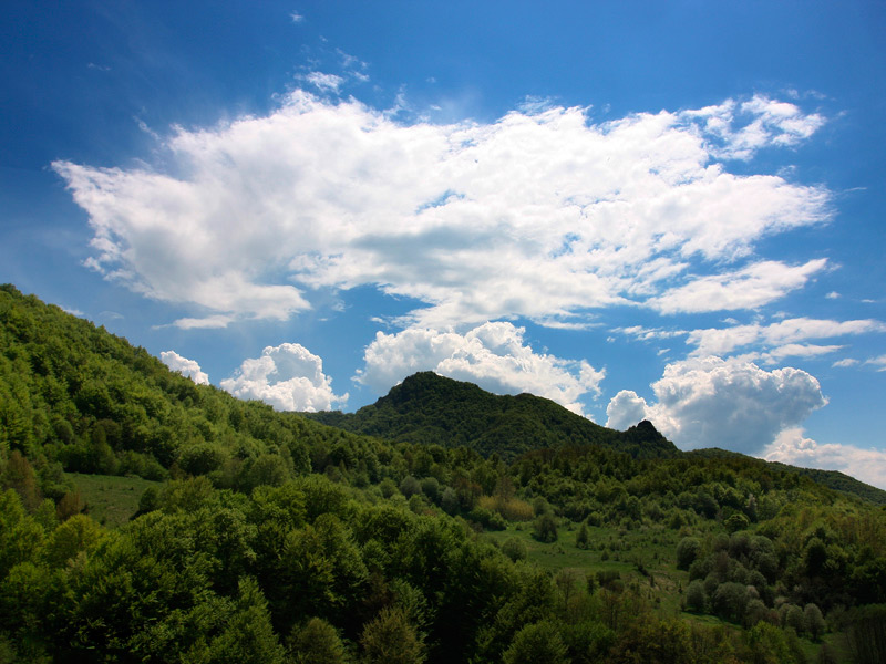 Јелеч,северна страна, фото: Бојан Миловић